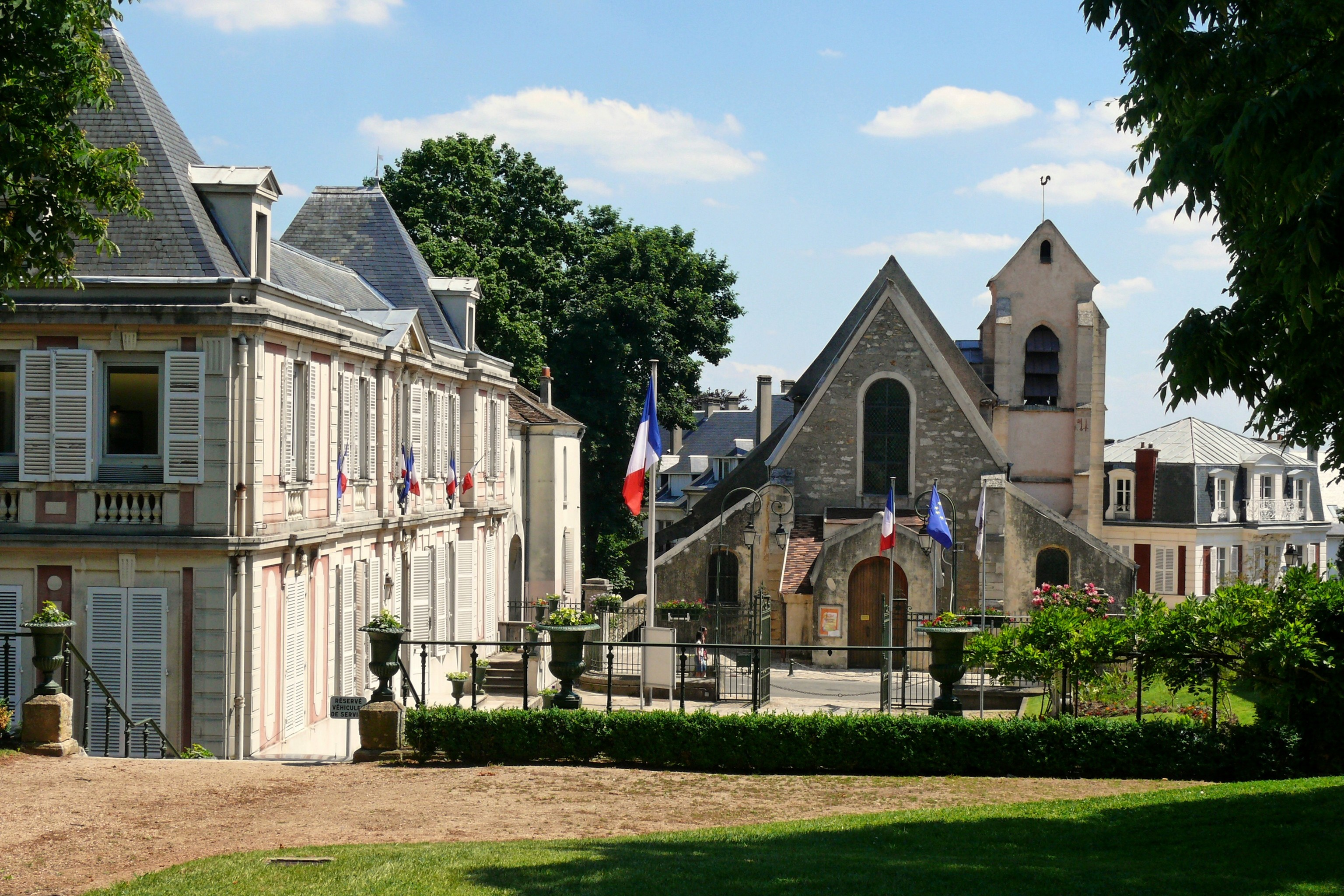 L'église de Villeneuve le Roi (94)